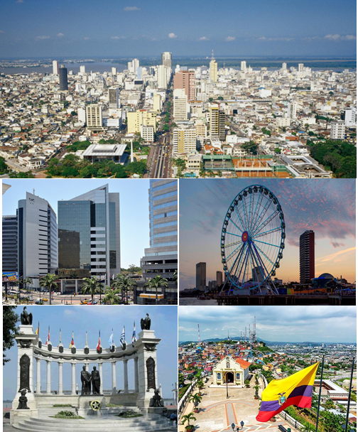 Varios sitios de Guayaquil